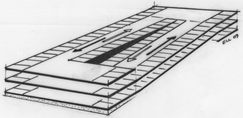 P-hus med lutande däck